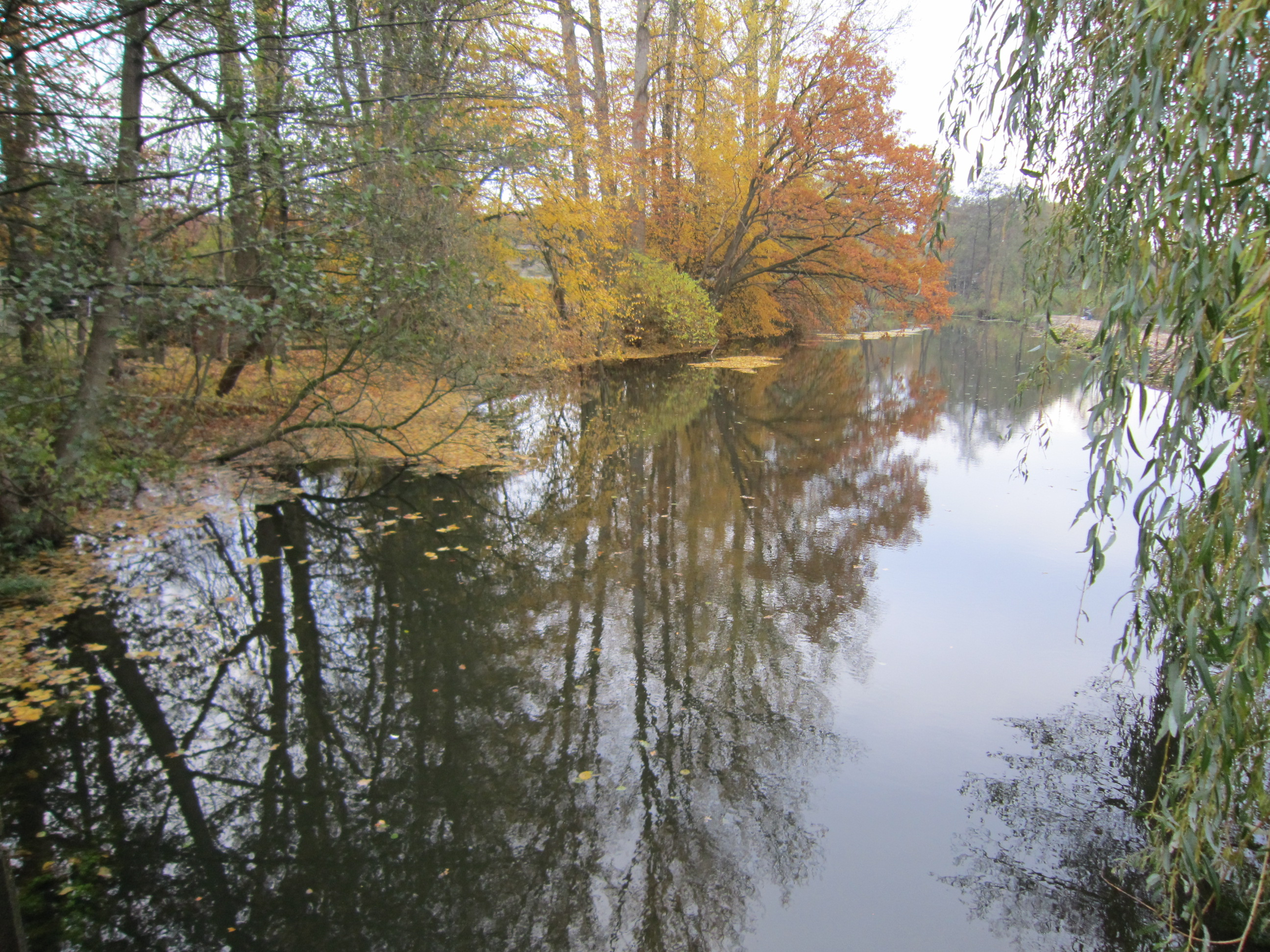 Mühlenteich bei Aumühle (Stadt Wildeshausen)